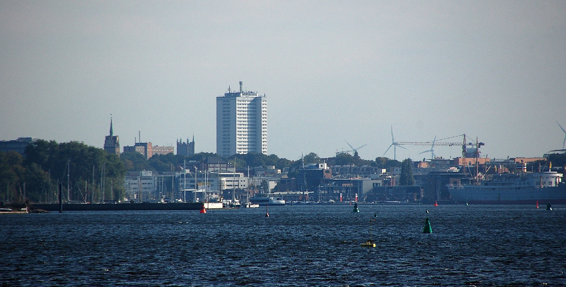 Rostock von der Warnow aus, Blick nach Süden